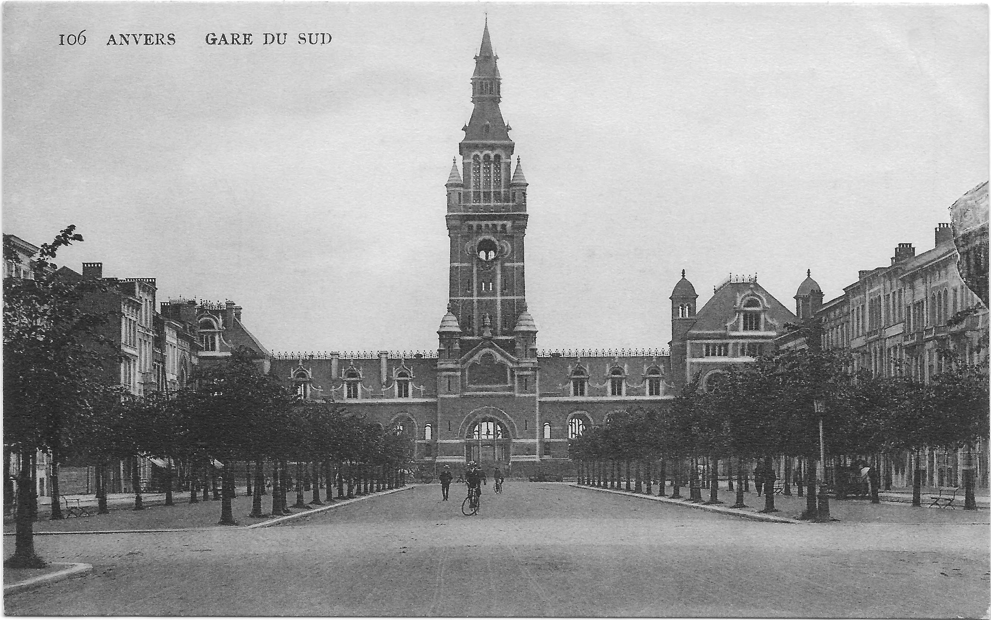 Het vroegere station Antwerpen Zuid op briefkaart